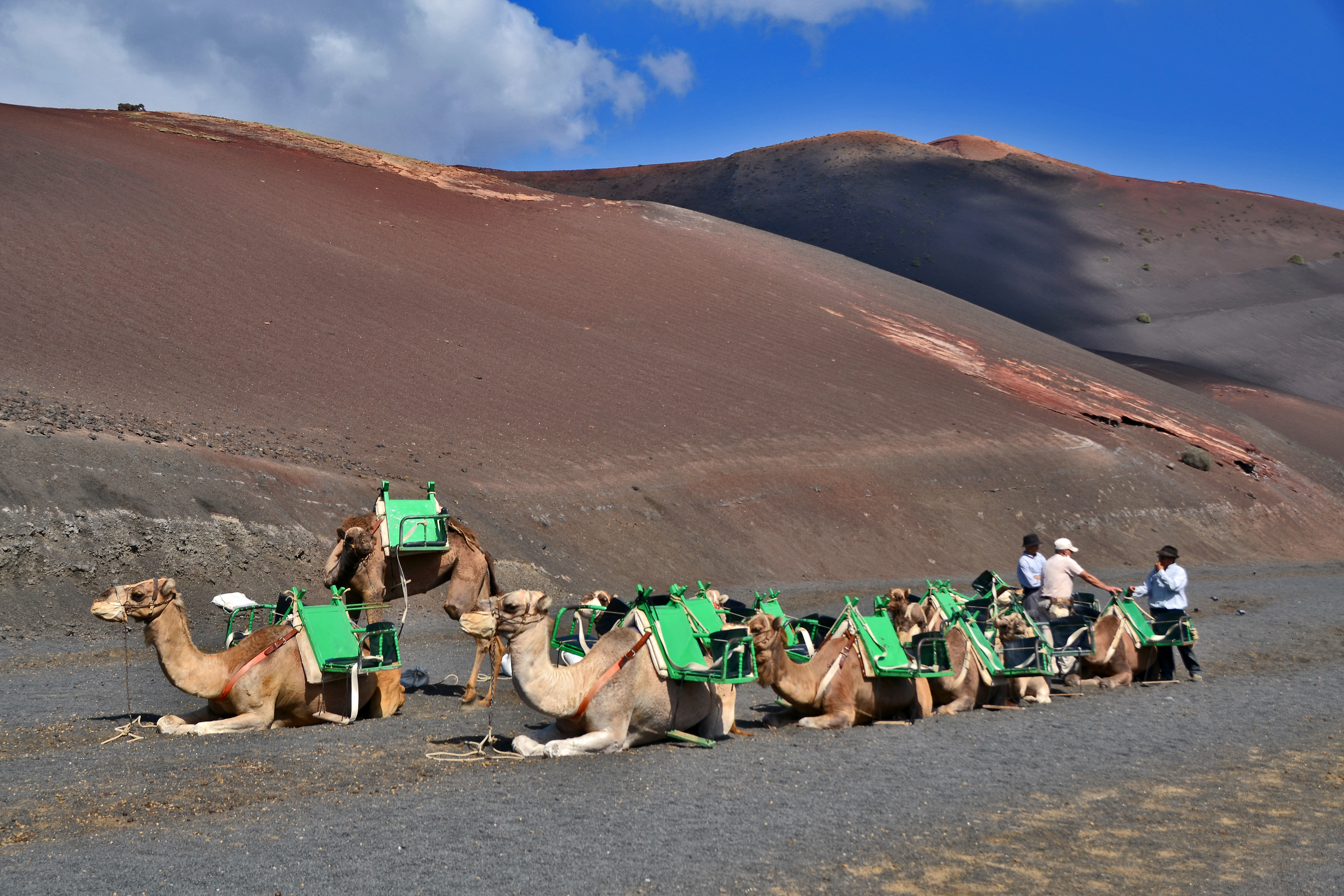 Montana Timanfaya - Echadero de los Camellos